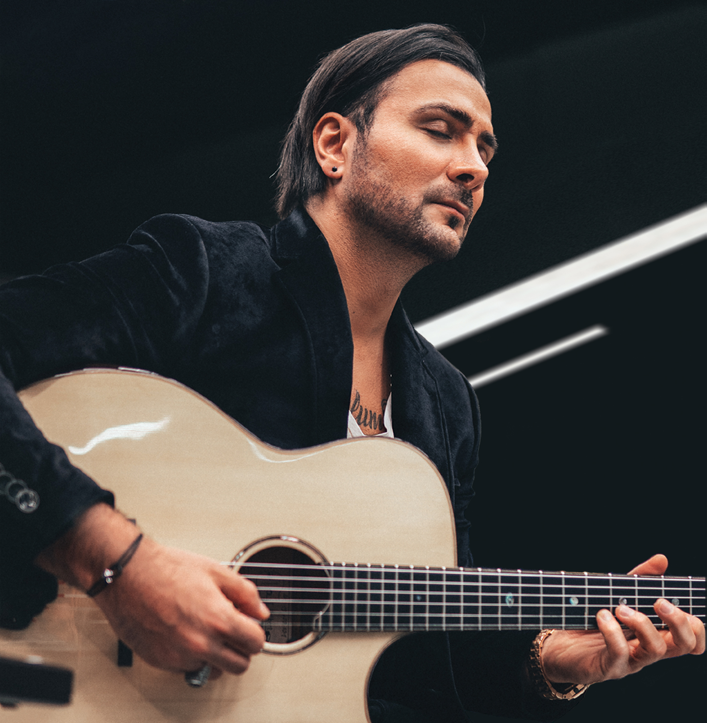 Hazar (*18. Juni 1977 als Ulaş Hazar im Osten der Türkei geboren; seit 2020 Künstlername Hazar) ist ein Jazz-Gitarrist und Saz-Spieler.